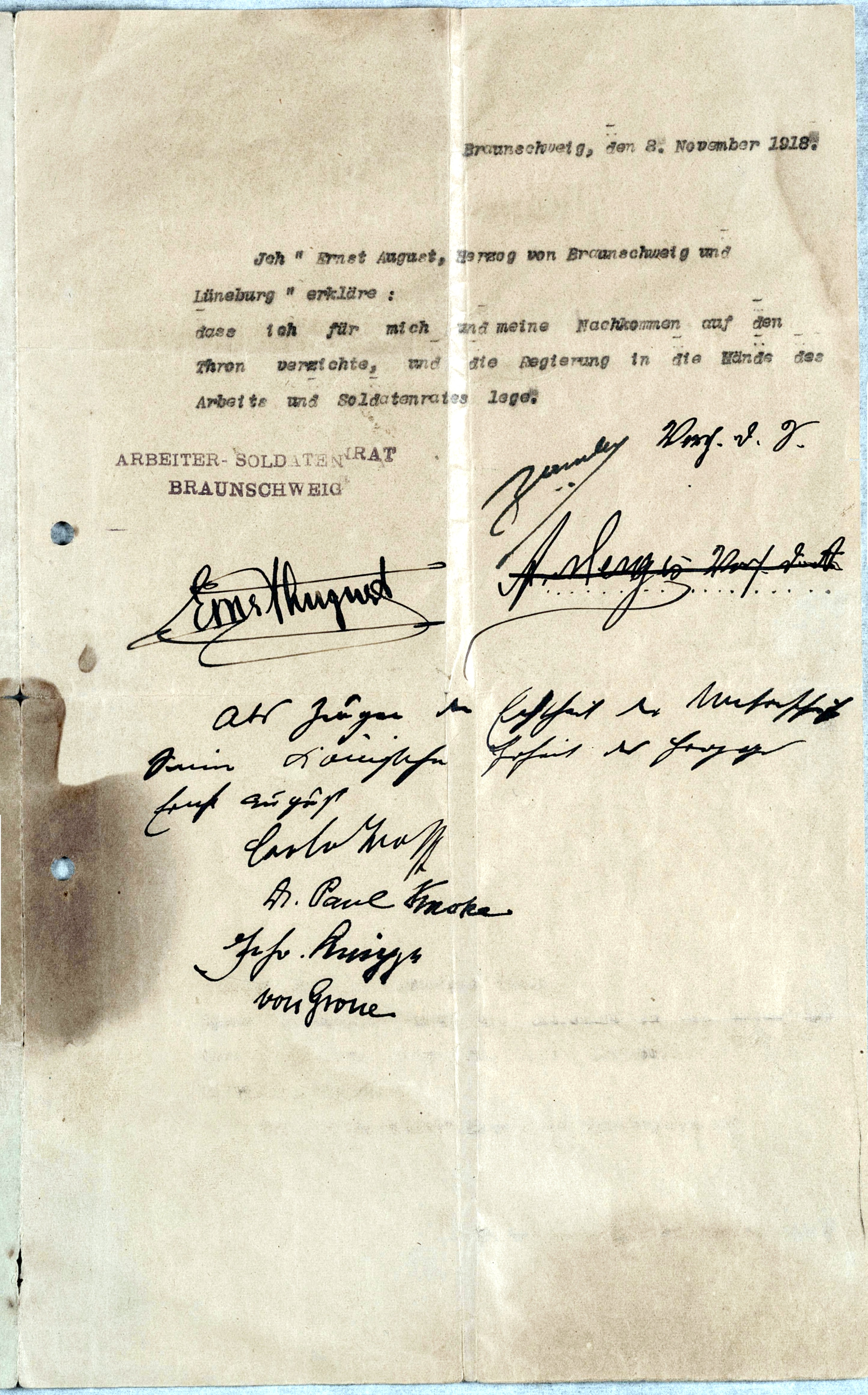 Abdankung Ernst August, Herzog von Braunschweig und LüneburgTranskription: maschinenschriftlich Braunschweig, den 8. November 1918. maschinenschriftlich Ich "Ernst August, Herzog von Braunschweig und maschinenschriftlich Lüneburg" erkläre: dass ich für mich und meine Nachkommen auf den maschinenschriftlich Thron verzichte, und die Regierung in die Hände des maschinenschriftlich Arbeits-[sic!] und Soldatenrates lege. Stempel ARBEITER – SOLDATENRAT Stempel BRAUNSCHWEIG Unterschrift Ernst August Unterschrift rechts daneben Zander Vors[itzender] d.[es] S.[oldatenrates] Unterschrift rechts daneben A. Merges Vors[itzender] d.[es] A.[rbeiterrates] [nachträglich durchgestrichen und unterpunktet] handschriftlich Als Zeugen der Echtheit der Unterschrift handschriftlich Seiner Königlichen Hoheit des Herzogs handschriftlich Ernst August Unterschrift Carl v. Wolff Unterschrift Dr. Paul Knoke Unterschrift Frhr. Knigge Unterschrift von Grone